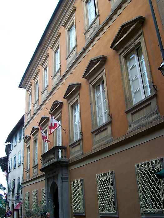 Volterra - Museo Etrusco Guarnacci